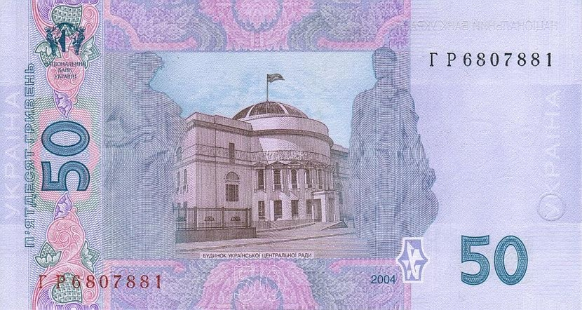 Ukraine 50 Hryven 2004 reverse